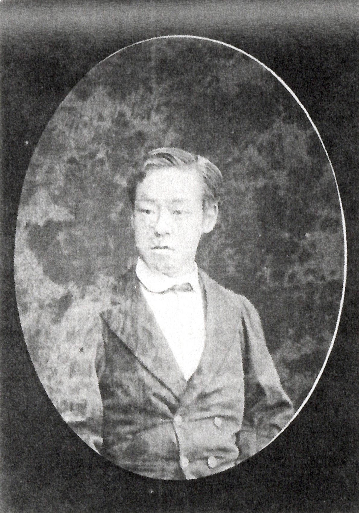 永井直哉の肖像写真。